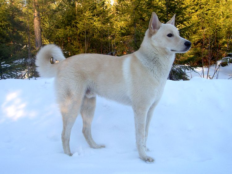 Canaan Dog